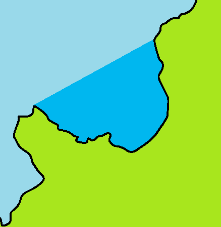 石狩湾の範囲を示した地図。 海岸線そのものは白地図専門店より。